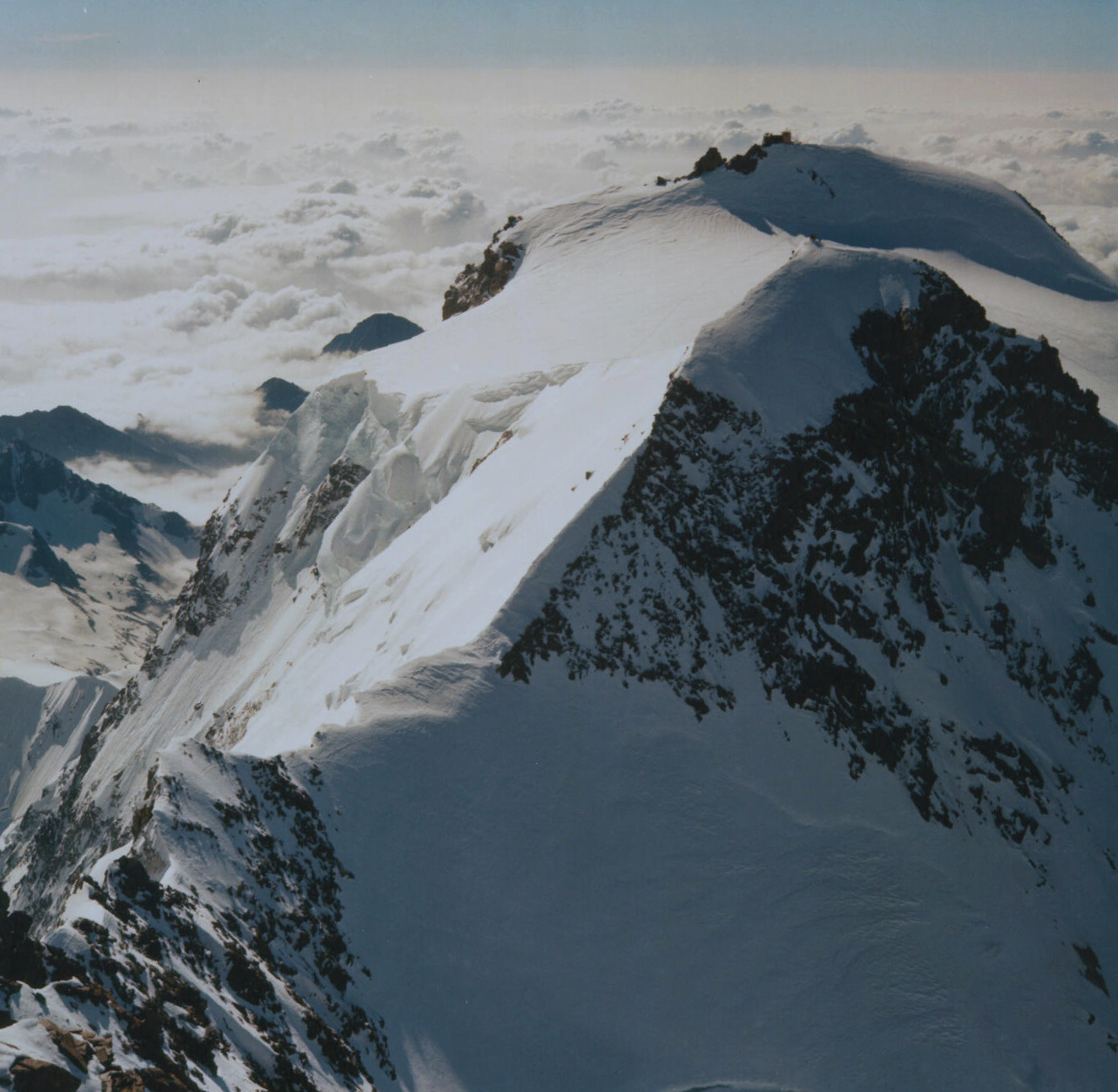 Zumsteinspitze von der Dufourspitze